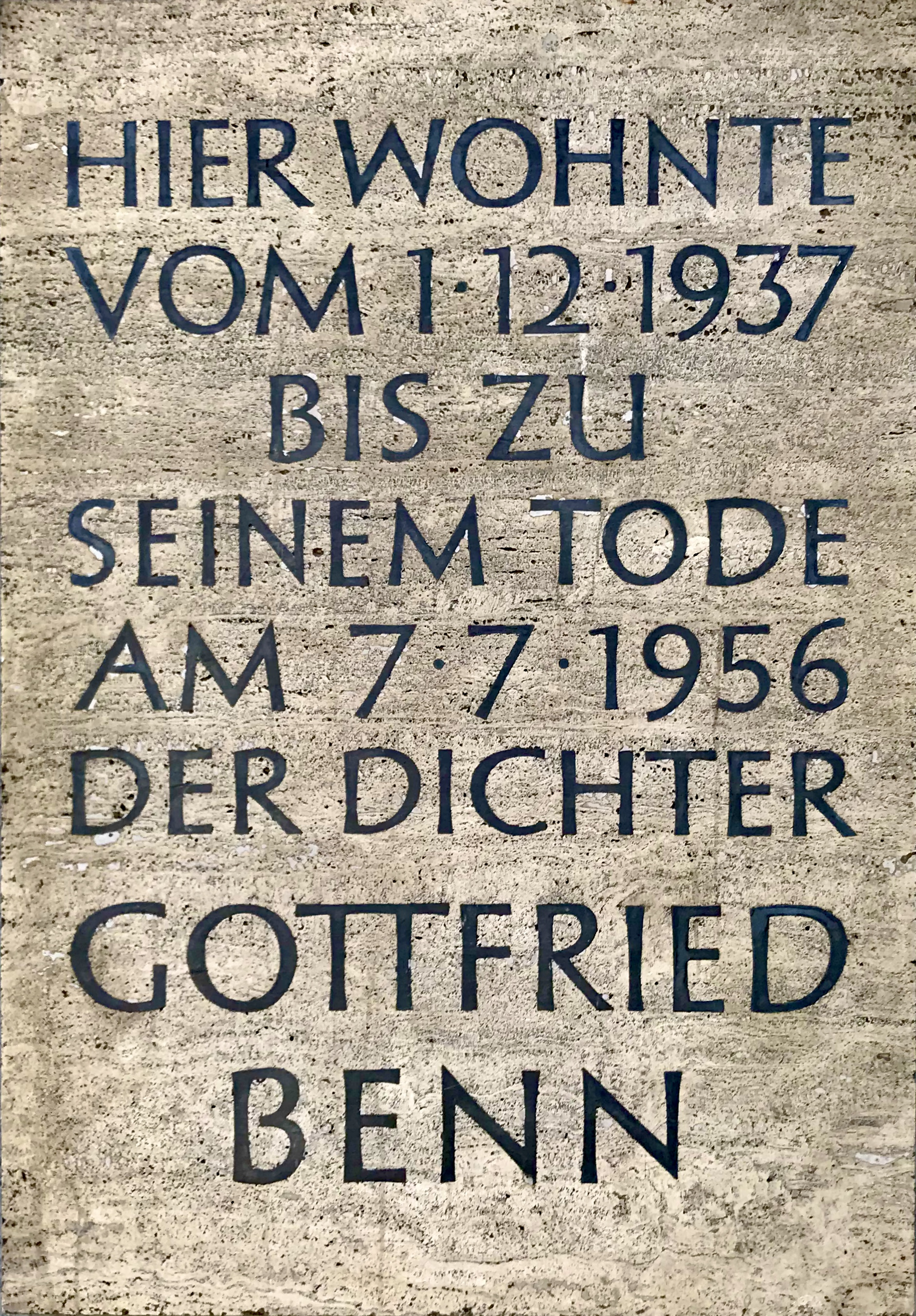 Gedenktafel am Wohnhaus.